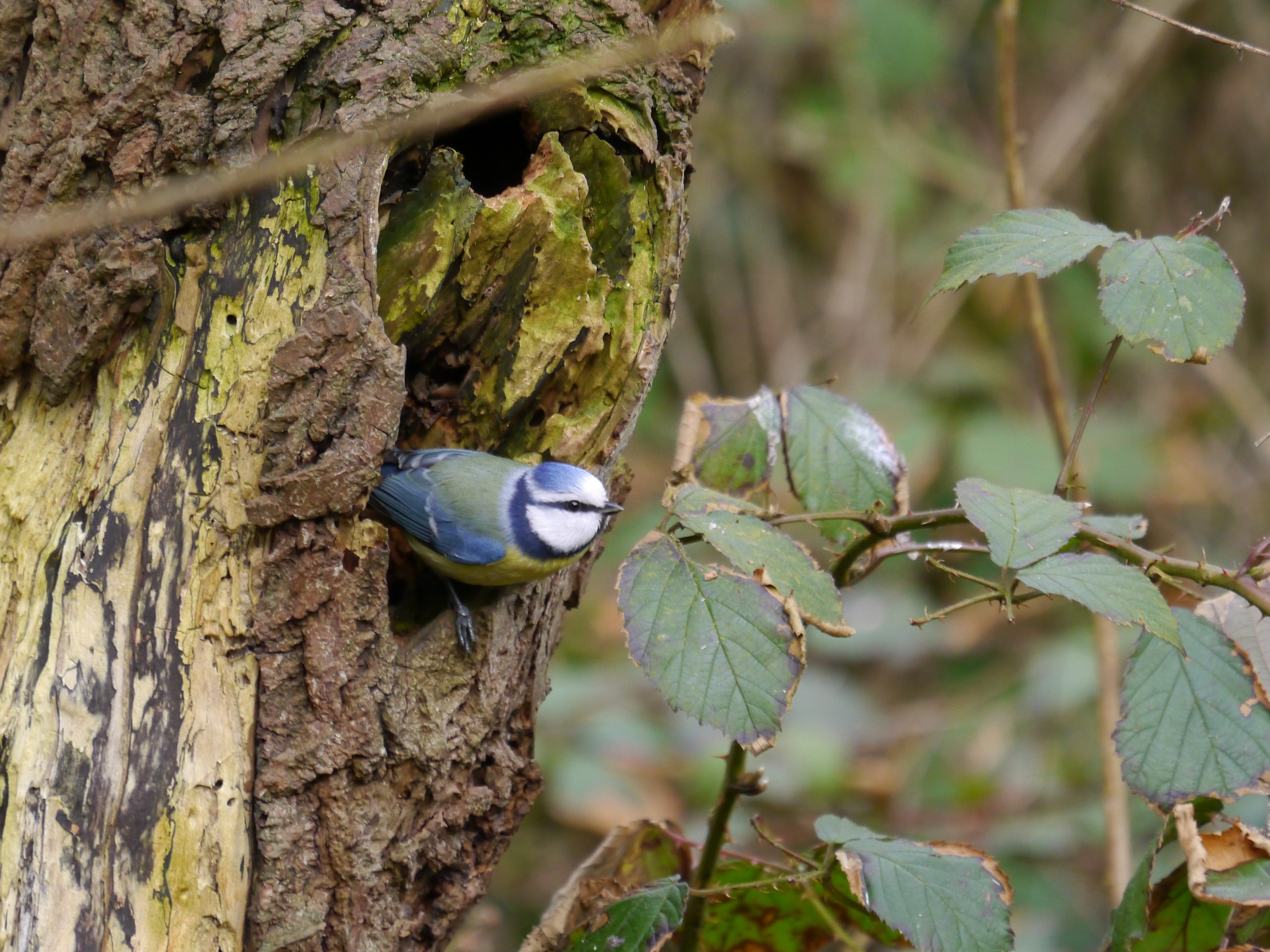 Eine Blaumeise (Cyanistes caeruleus), die auf der Suche nach dem richtigen Ort für ihr Nest ist; aufgenommen im Landschaftsschutzpark Twedter Mark; LSG „Landschaftsteil Fördeufer Mürwik-Solitüde“ in Flensburg